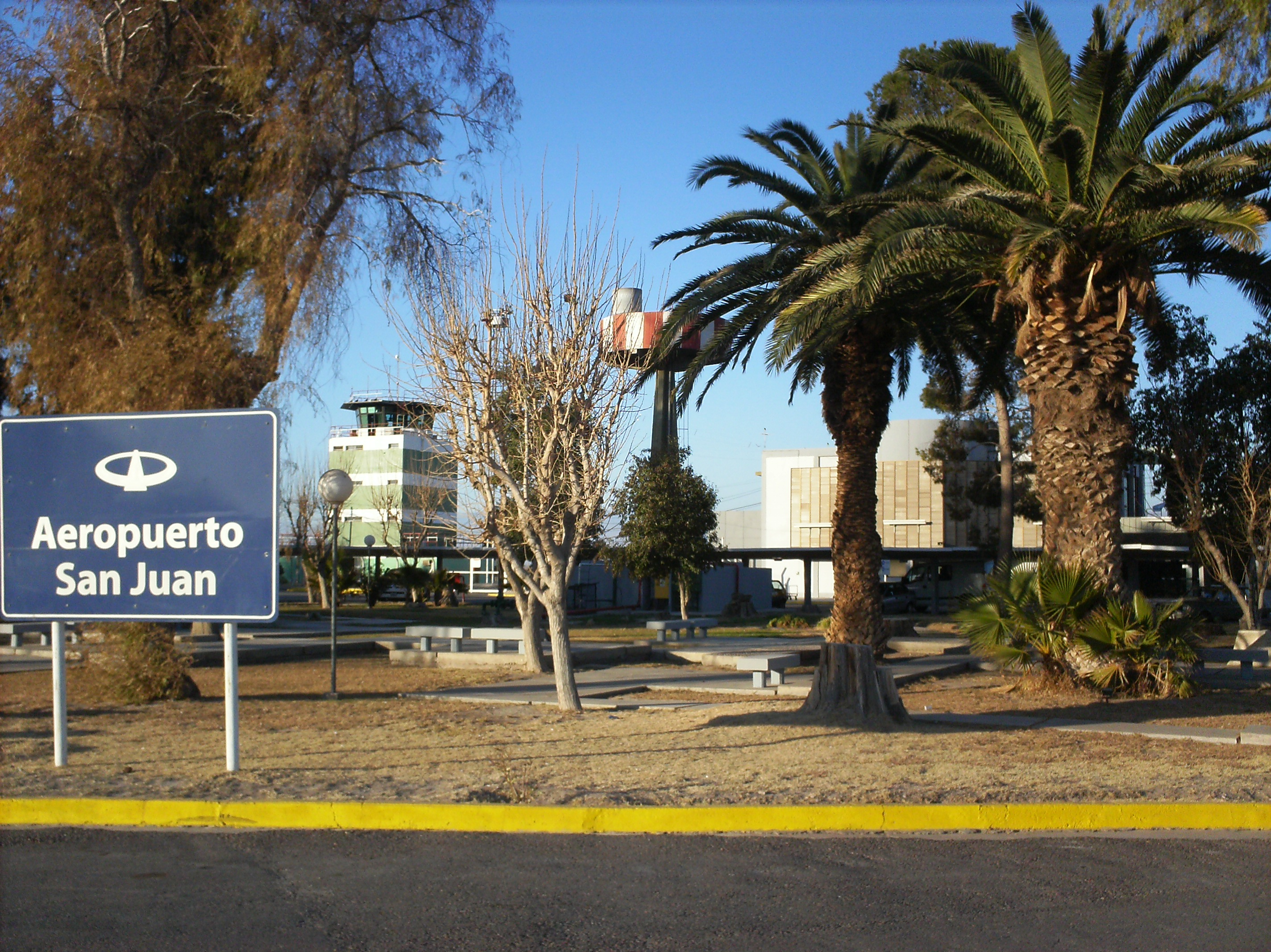 la entrada al aeropuerto junto con sus edificiaciones